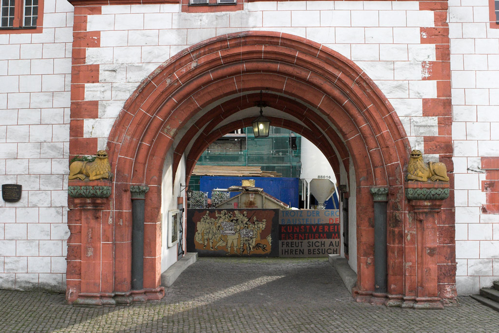 Romanischer Torbogen Eisenturm Mainz (um 1240)